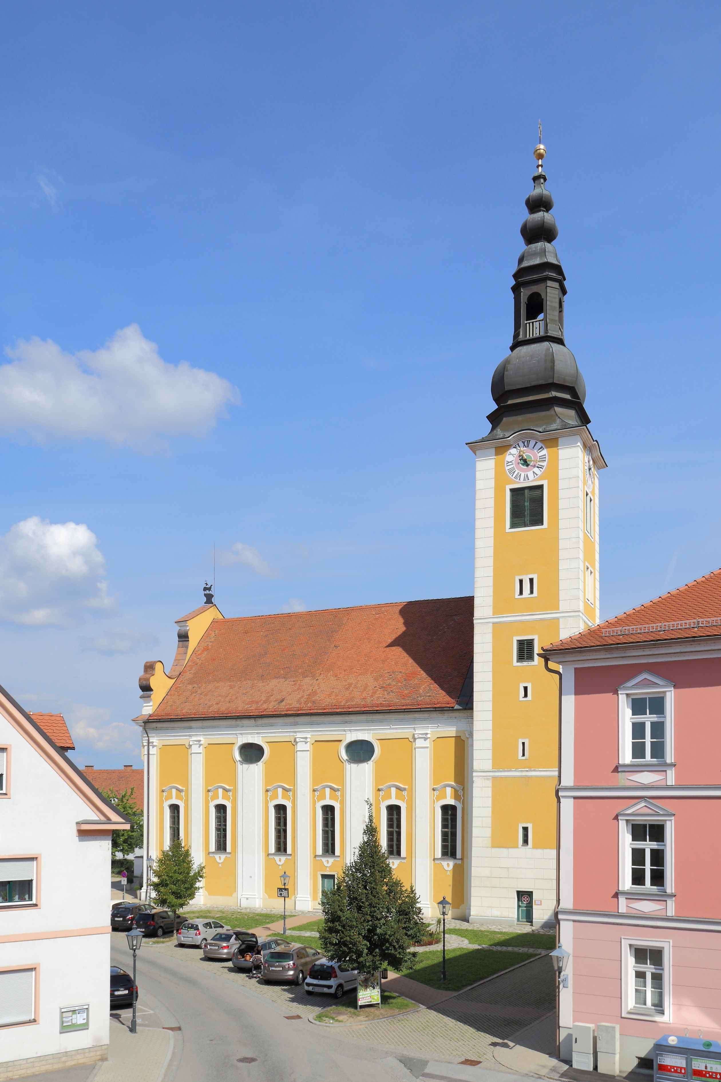 Katholische Pfarrkirche hl. Johannes der Täufer der steiermärkischen Stadt Fürstenfeld. Ursprünglich vom Malteserorden zwischen 1200 und 1220 errichtet. Im 15. Jahrhundert fiel die Kirche den Ungarn- und Türkenstürmen zum Opfer und wurde wieder aufgebaut. Der heutige Kirchenbau präsentiert sich vorwiegend im Barock, jedoch der Turm, der zweijochige Chor mit 5/8-Schluß und Teile der Westfassade sind im Baukern noch gotisch.